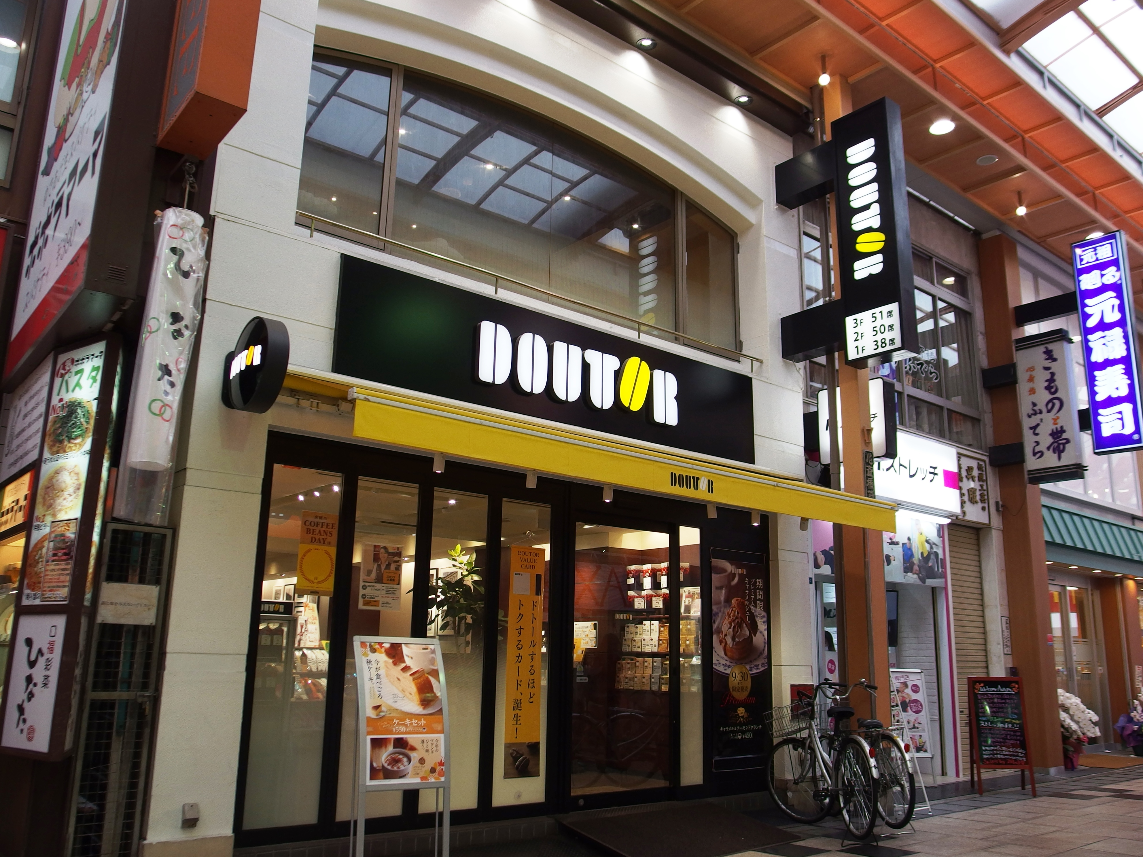 ドトールコーヒーショップ北心斎橋店（旧称は大阪本店）, 大阪府, 大阪市